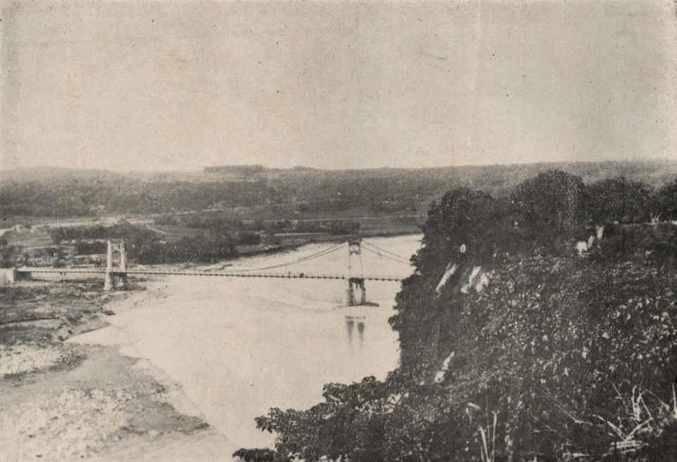 日治時期的大溪橋